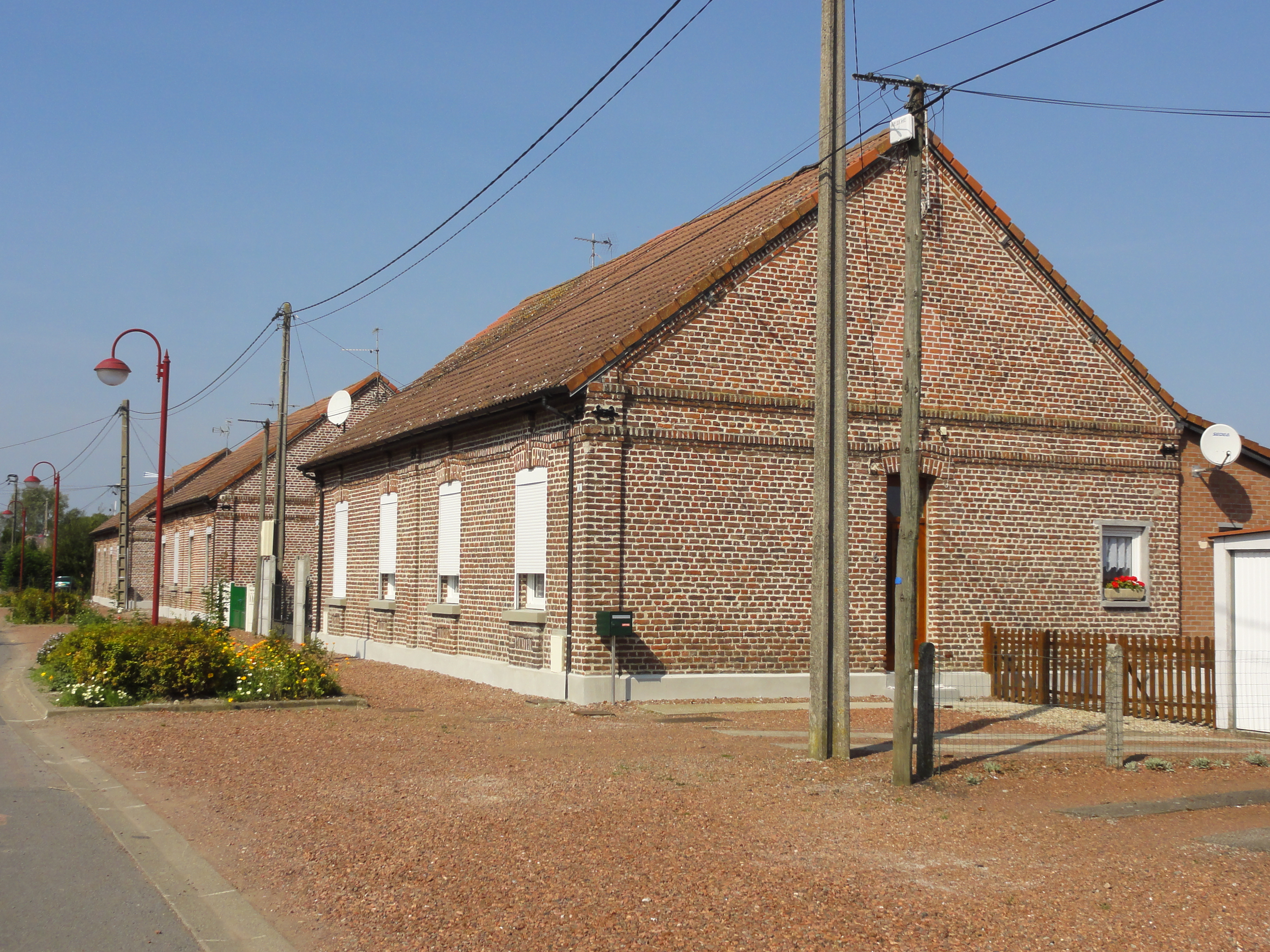 Cité des Hauts Champs de la fosse Saint-Pierre de la Compagnie des mines de Thivencelle dans le bassin minier du Nord-Pas-de-Calais, Thivencelle, Nord, Nord-Pas-de-Calais, France.